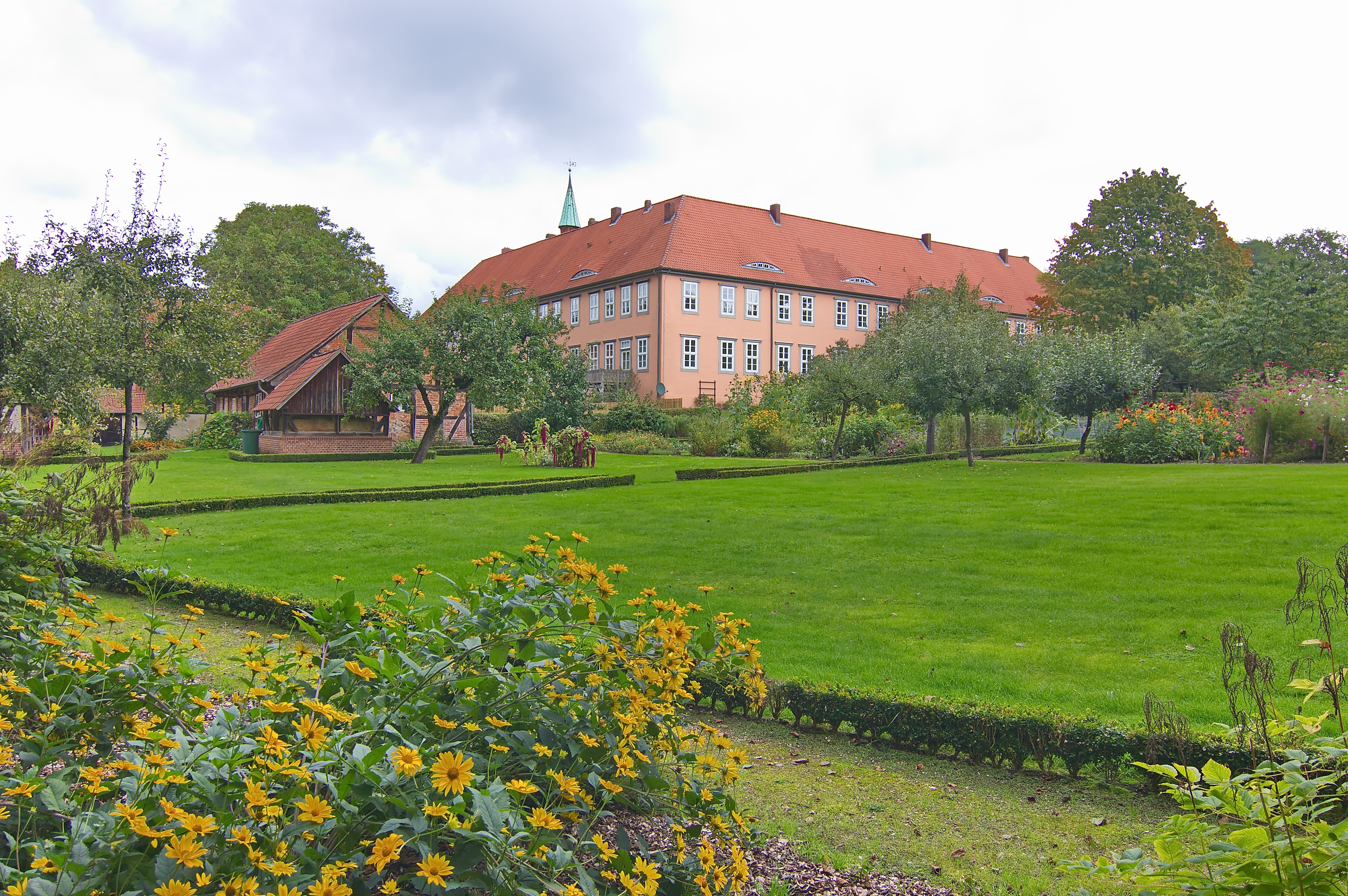 Das Kloster Isenhagen am Ortsrand von Hankensbüttel entstand in den Jahren 1345–1350 als Zisterzienserinnenkloster und ist seit 1540 ein evangelisches Damenstift.